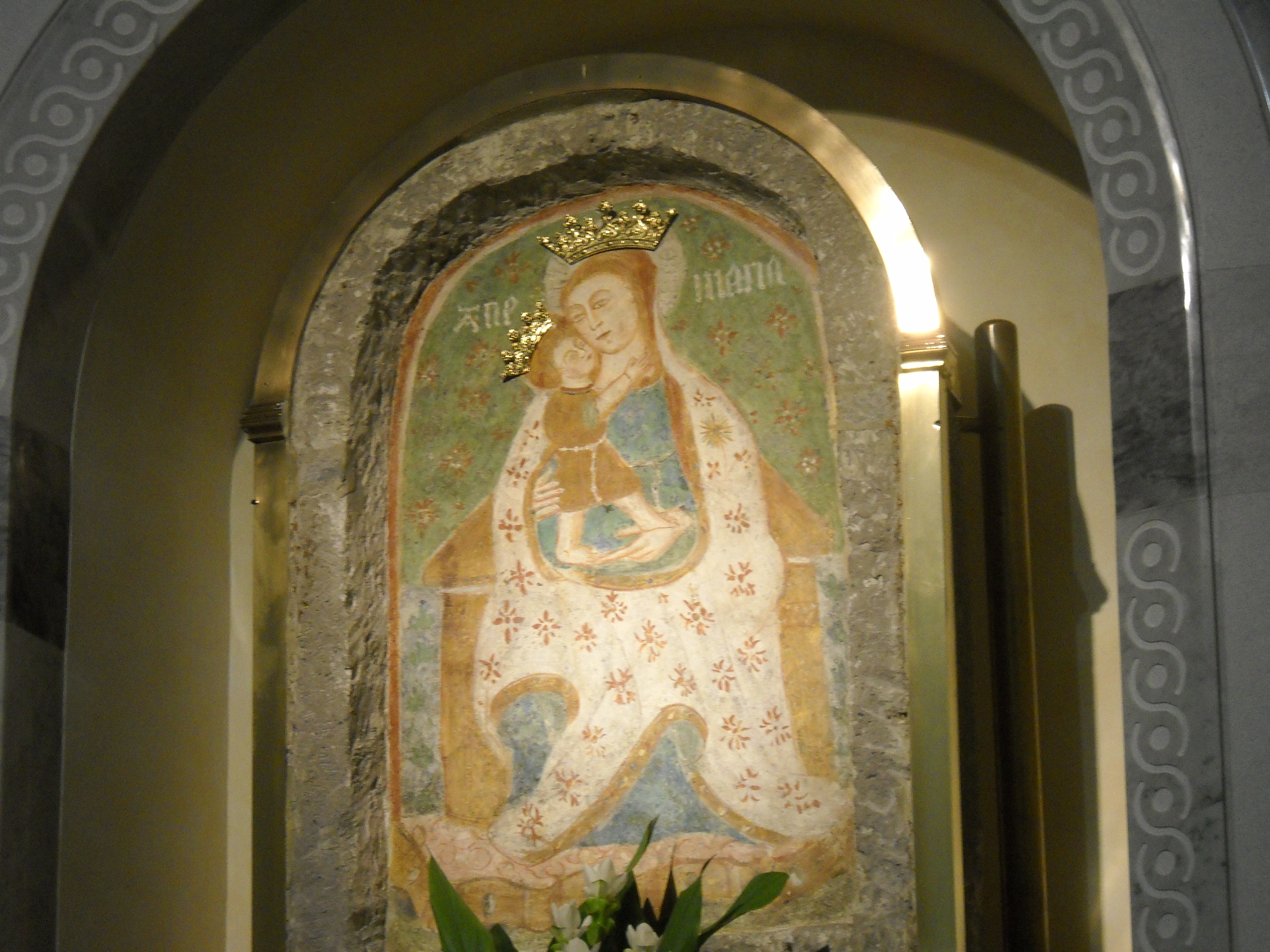 Icona in tufo rappresentante l'immagine sacra